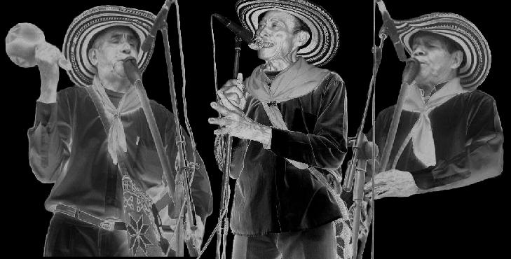 Los gaiteros de San Jacinto: Nicolas Hernandez, Juancho Fernandez, y Toño Garcia